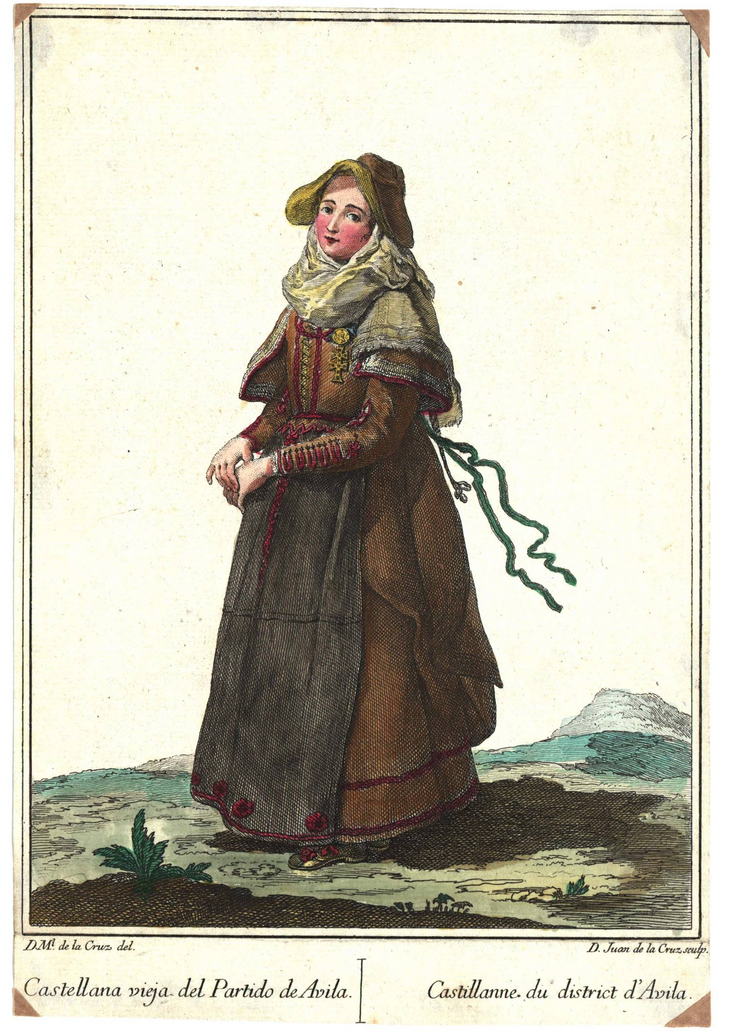 Serrano artesonero del partido de Ávila, España. Aguafuerte y buril.